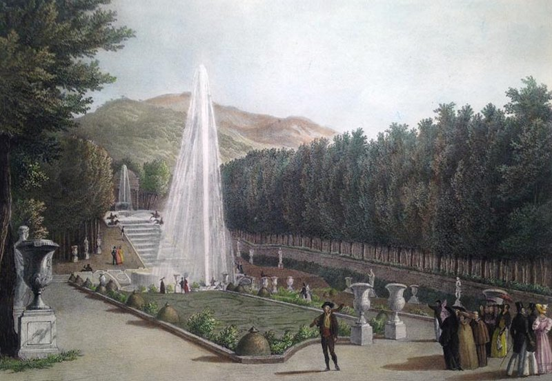 Vista general de la Cascada Nueva y parterre grande del palacio de La Granja (1821), de Fernando Brambilla, Palacio Real de Aranjuez, Madrid.